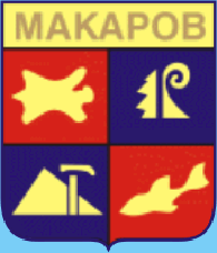 Герб города Макаров Сахалинской области